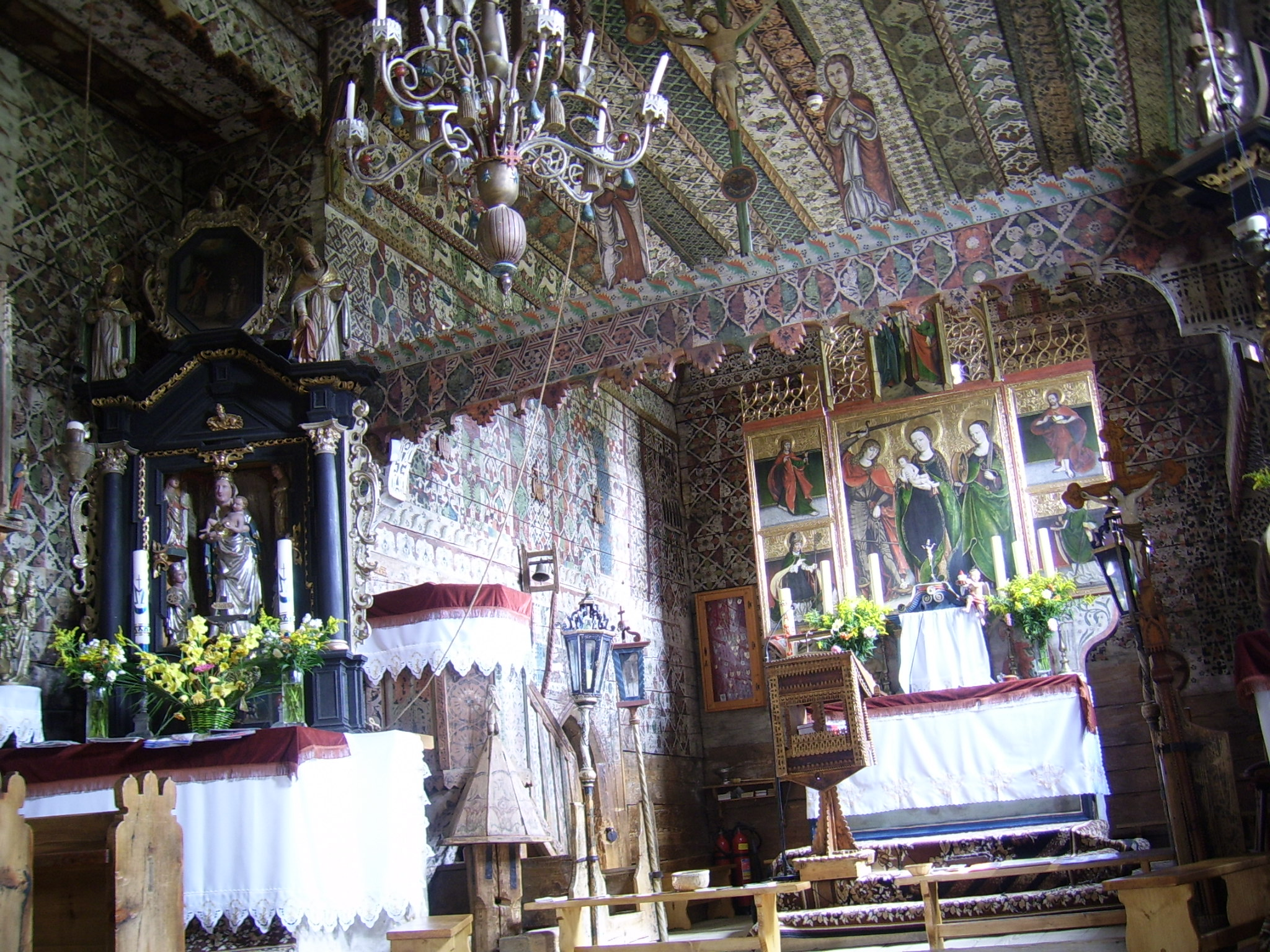 Kościół drewniany z XV wieku. Licencje CC